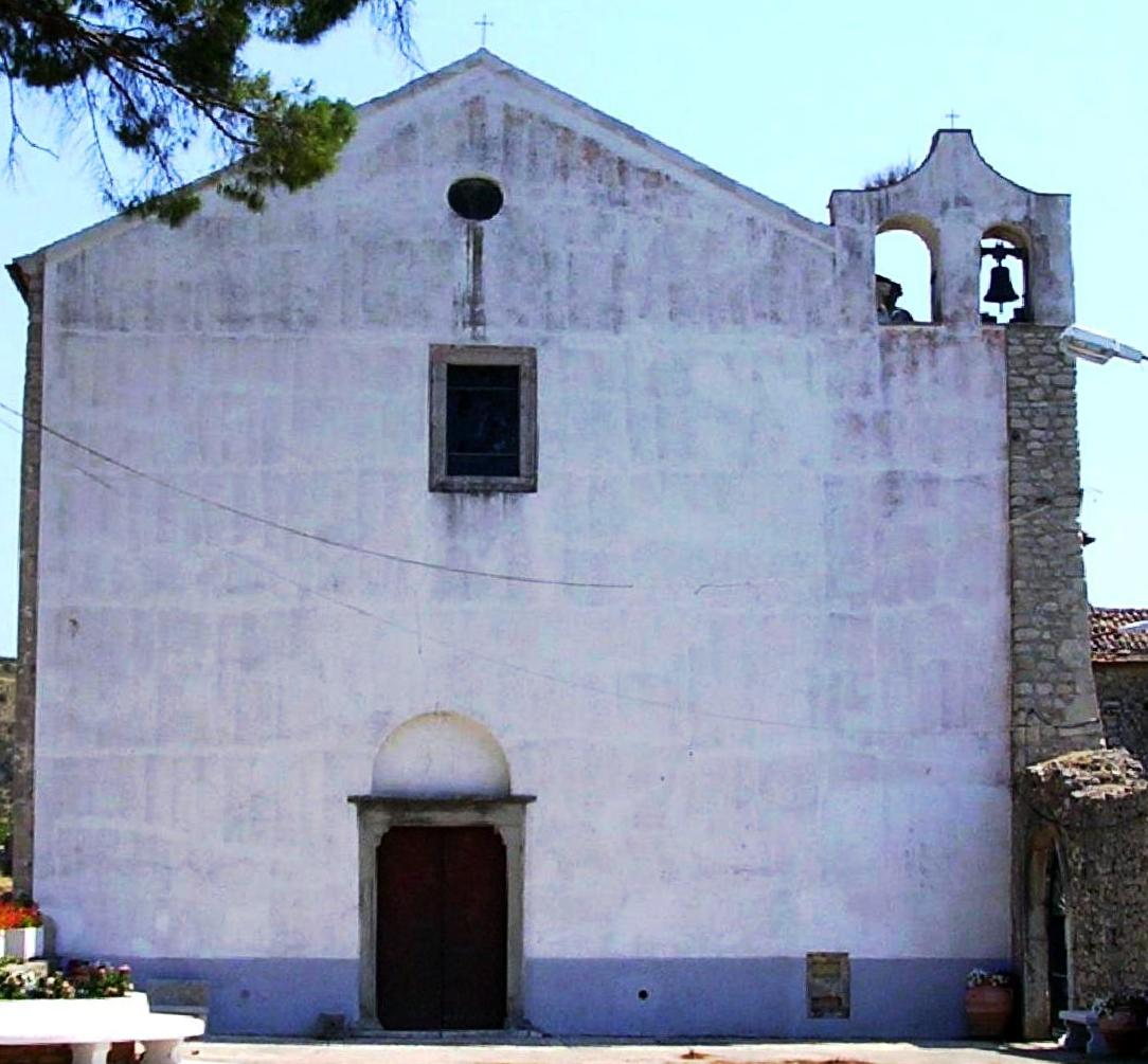 Chiesa di Santa Maria della Strada nel comune di San Lorenzo Maggiore, provincia di Benevento.